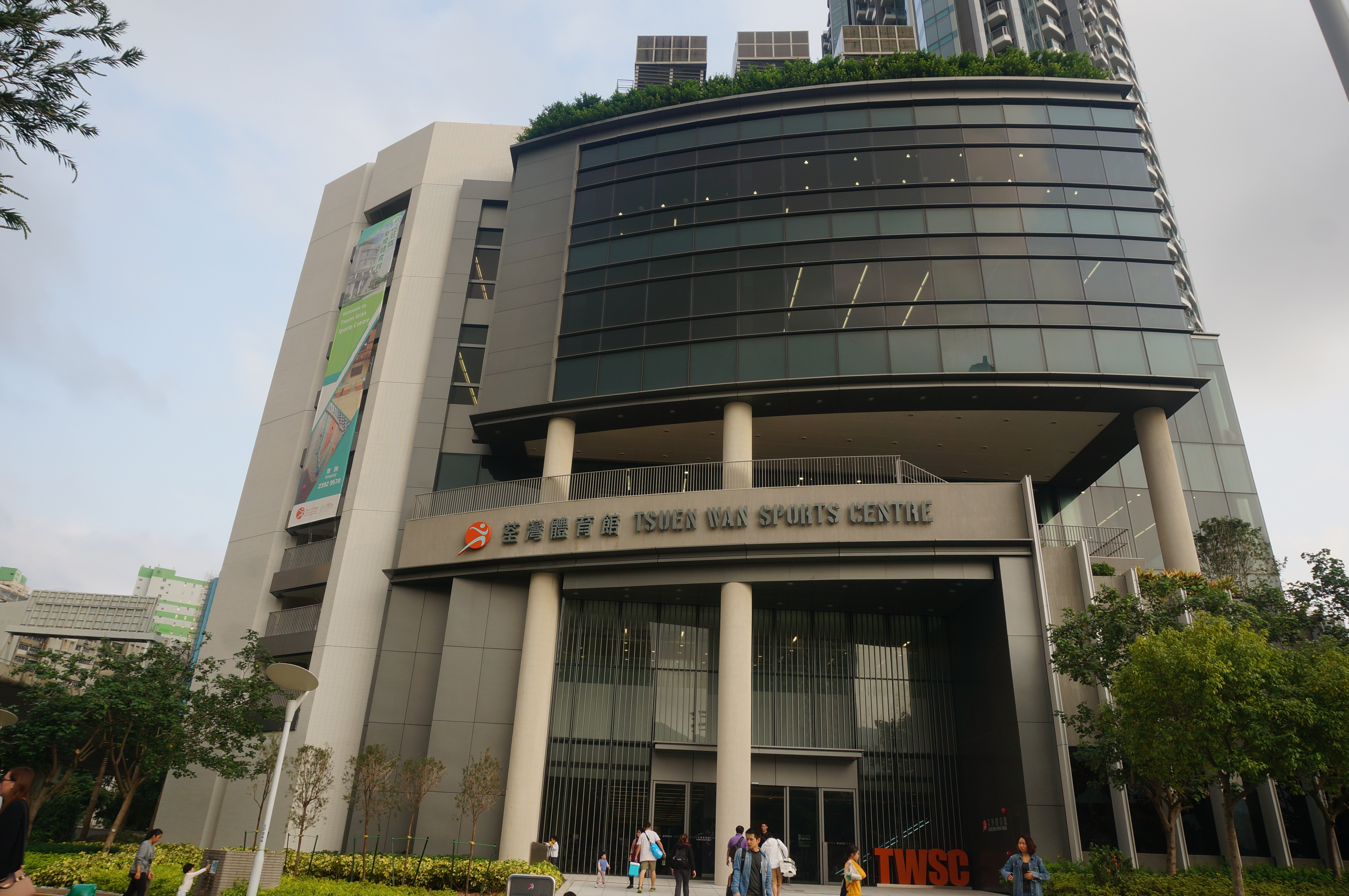 荃灣體育館外貌